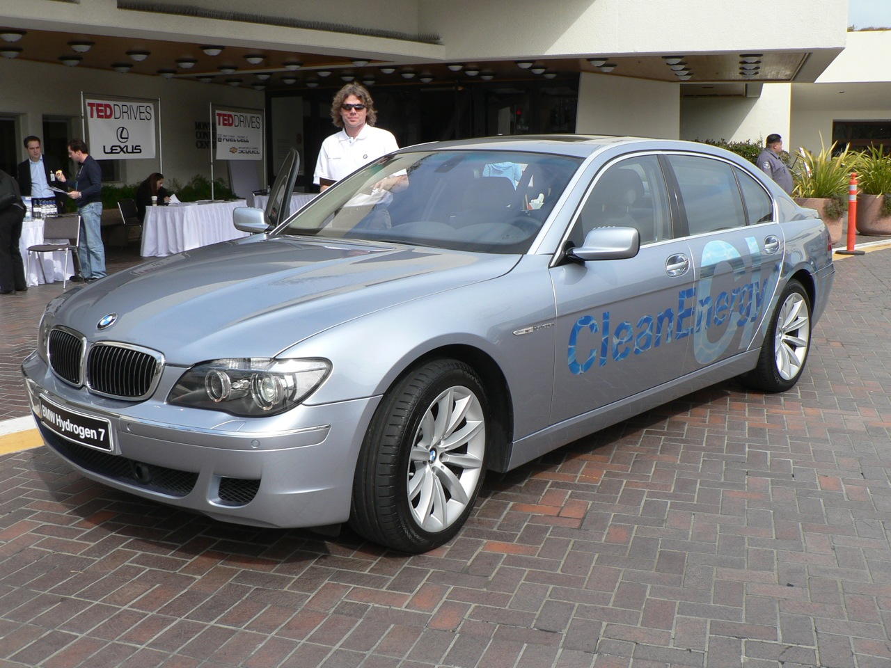 BMW Hydrogen 7